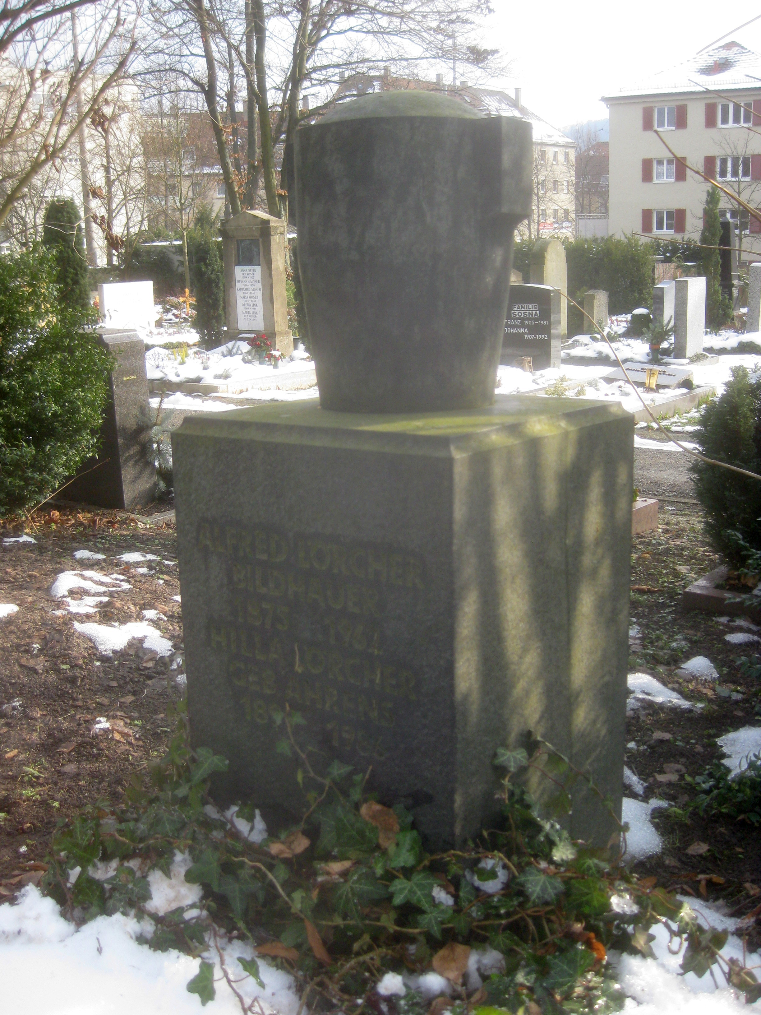 Grab Alfred Lörcher (1875–1962), Bildhauer, mit Urne auf Steinsockel von Alfred Lörcher, Ausführung: Willi Schönfeld, 1962, Stuttgart, Bergfriedhof, Abteilung 18.